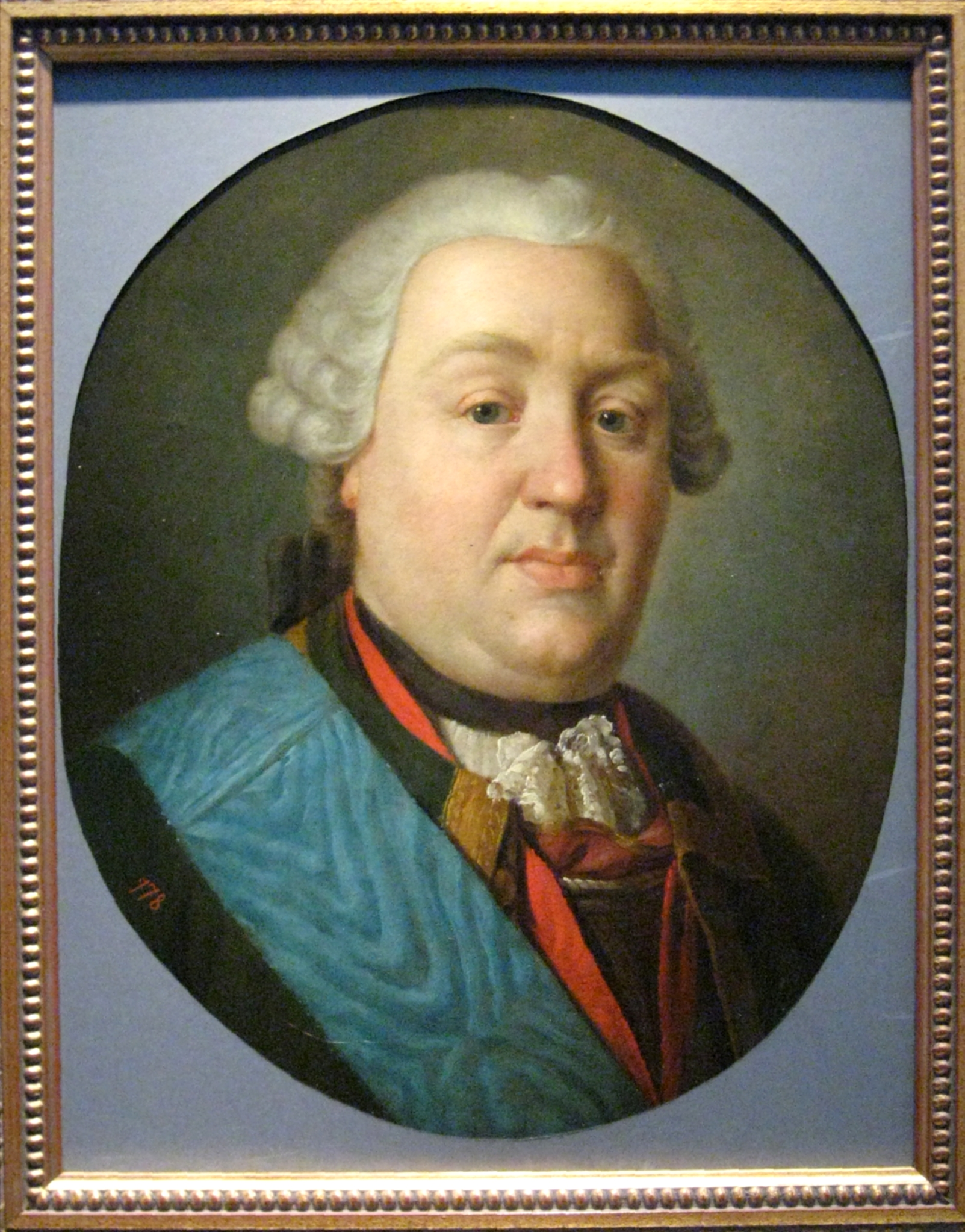 Неизвестный художник сер. 18 века. Портрет А.Б. Бутурлина. ГИМ.